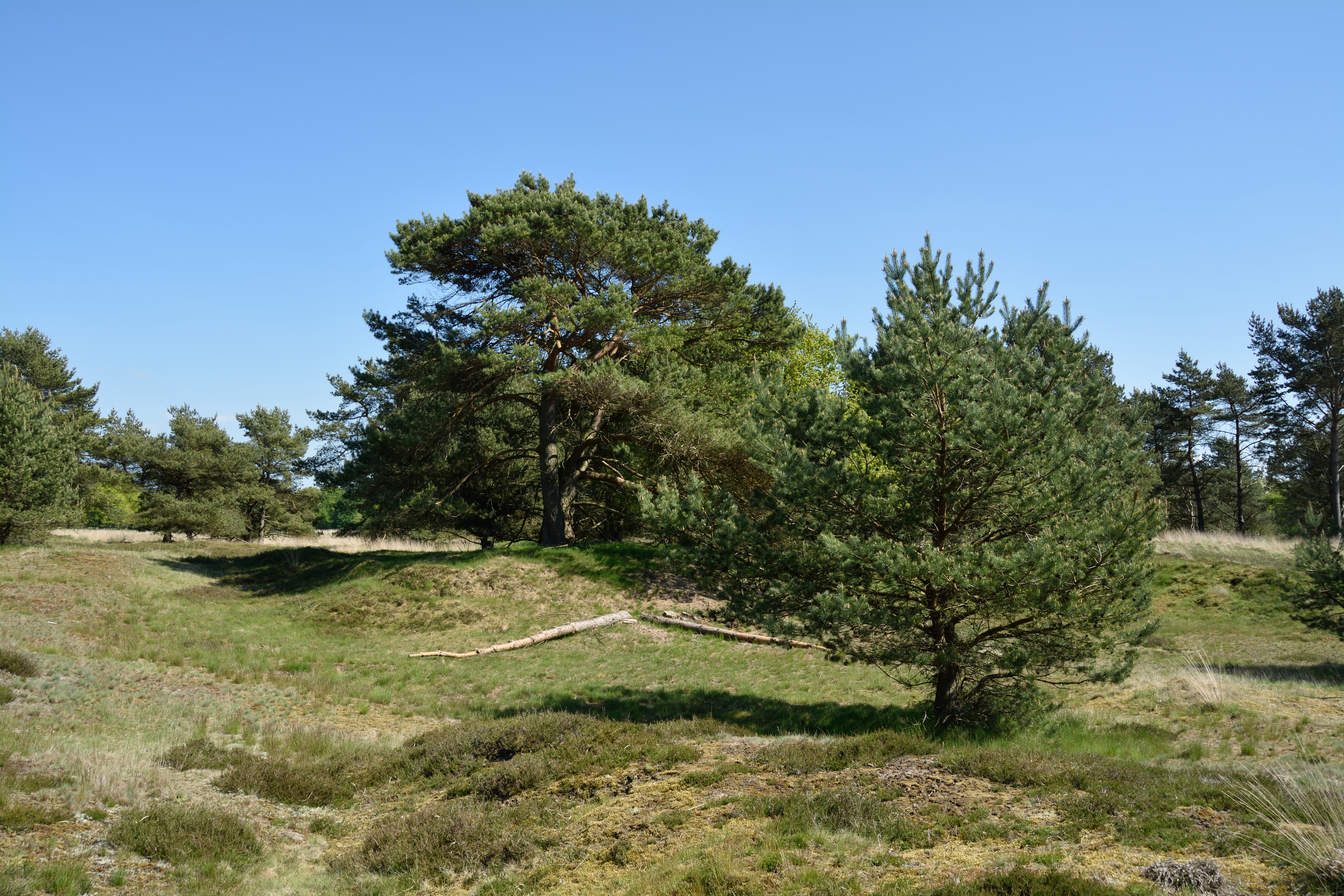 Naturschutzgebiet im Kreis Segeberg Impressionen aus dem Gebiet "Barker Heide"